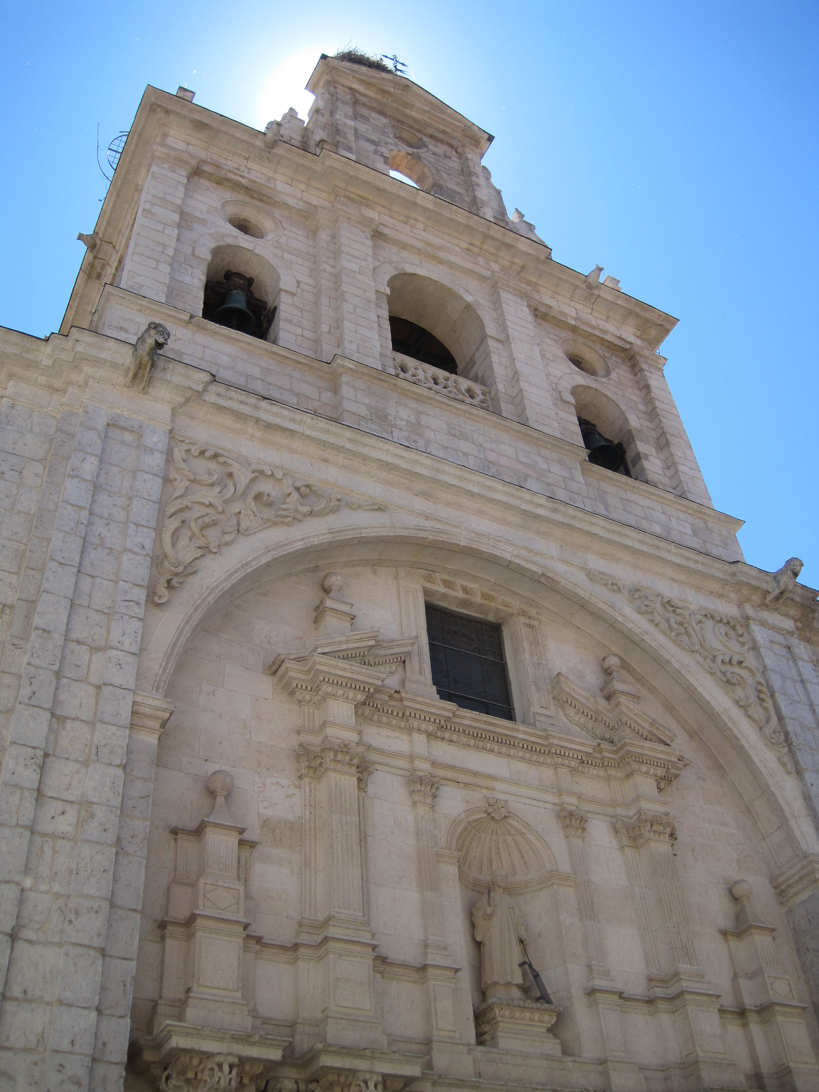 Fachada principal de la iglesia de San Lorenzo.